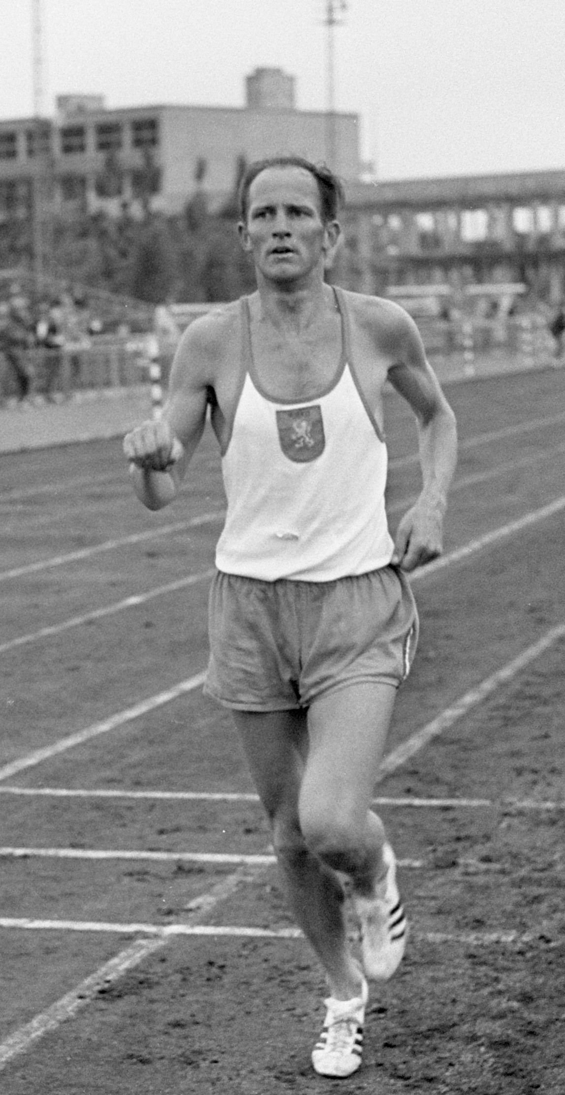 Aad Steylen (nummer 4) in actie